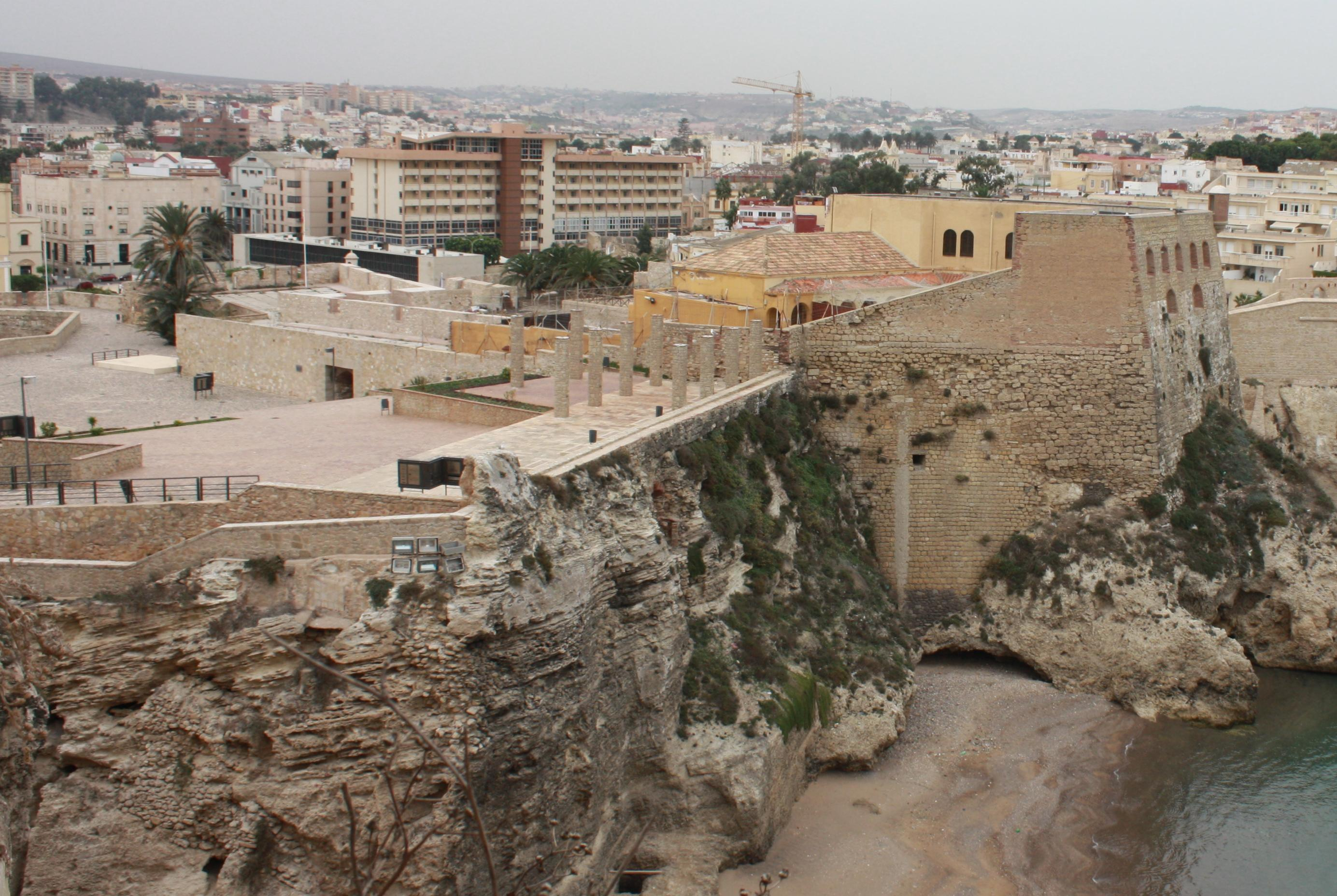 Vista de la Plaza de Armas y del baluarte de San Pedro desde el baluarte de la Concepción, en Melilla